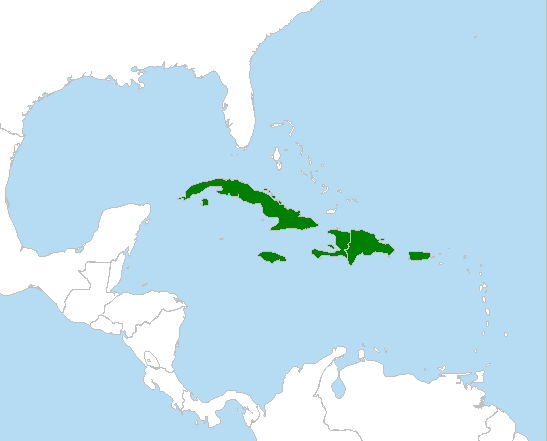 Todidae Verbreitungsmap Quelle/Source: selbst gemacht/self made